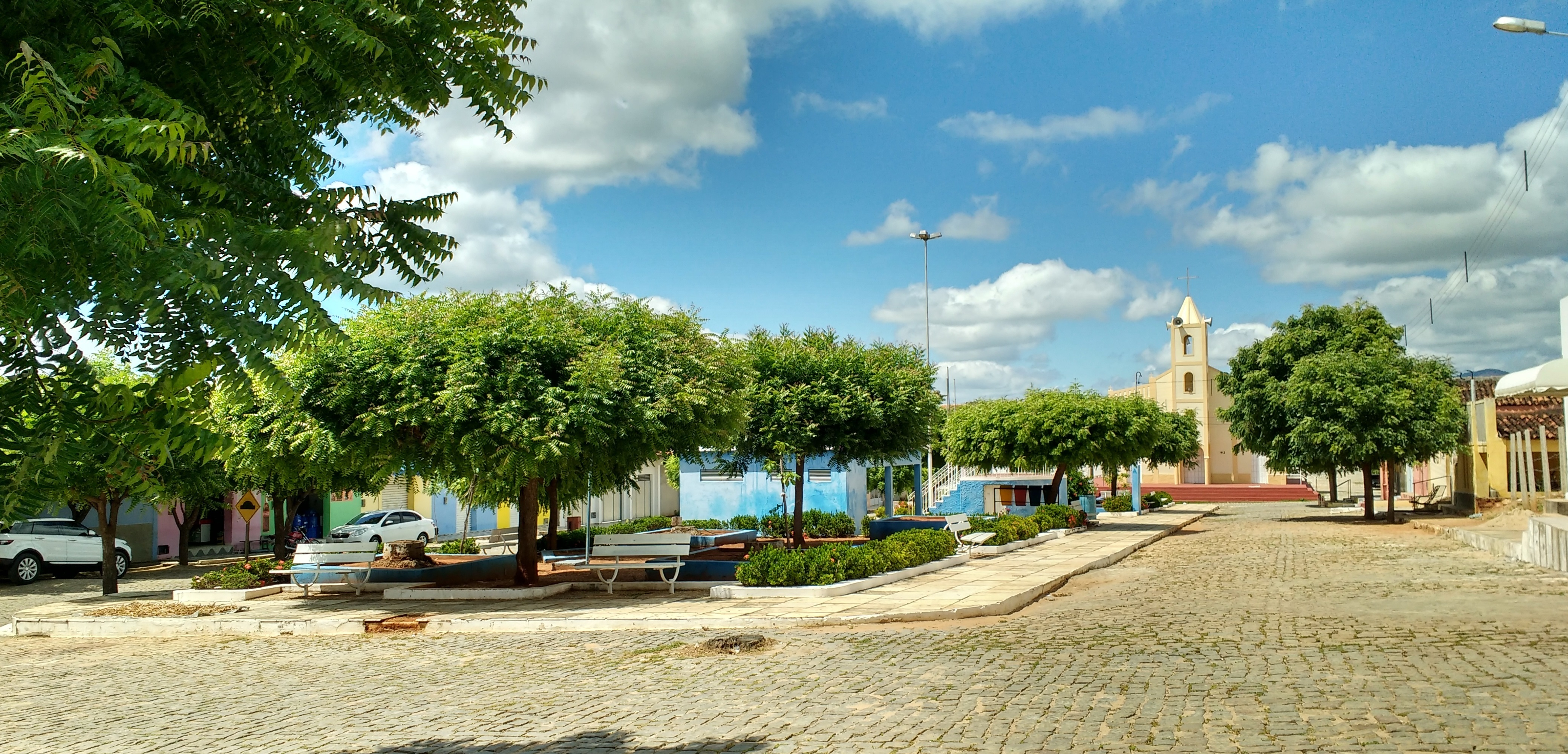 Praça Adrião Duarte em Lucrécia, Rio Grande do Norte (Brasil). Ao fundo a capela de São Francisco de Assis, da paróquia de Almino Afonso.